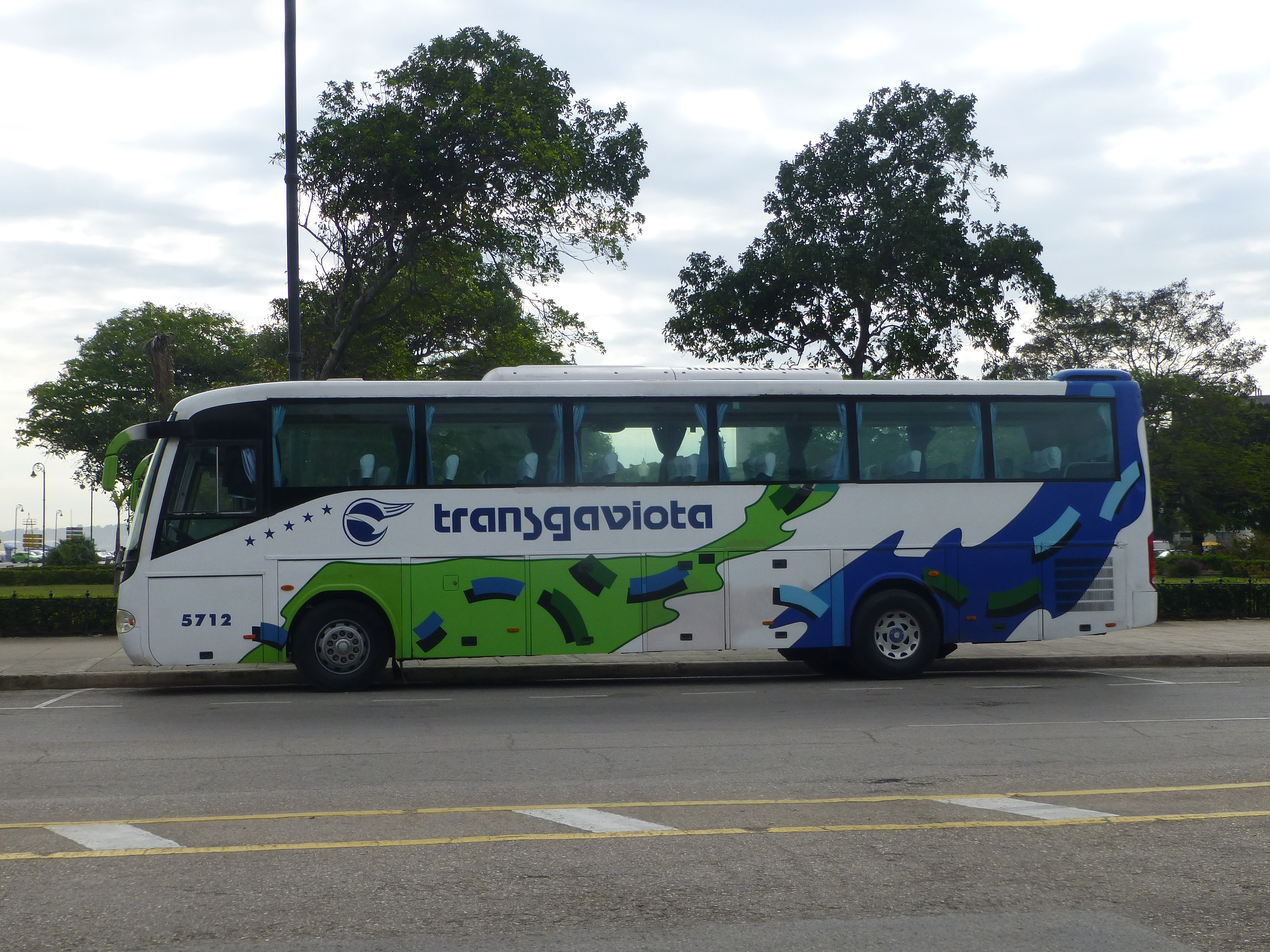 Bus à La Havane (Cuba)